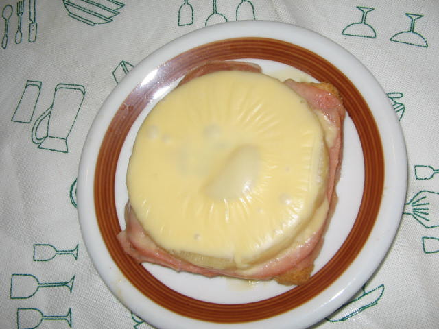 Toast Hawaii, fertig Quelle: eigene Aufnahme am 16. March 2005 Fotograf: Janez Novak, Ljubljana, Slovenija